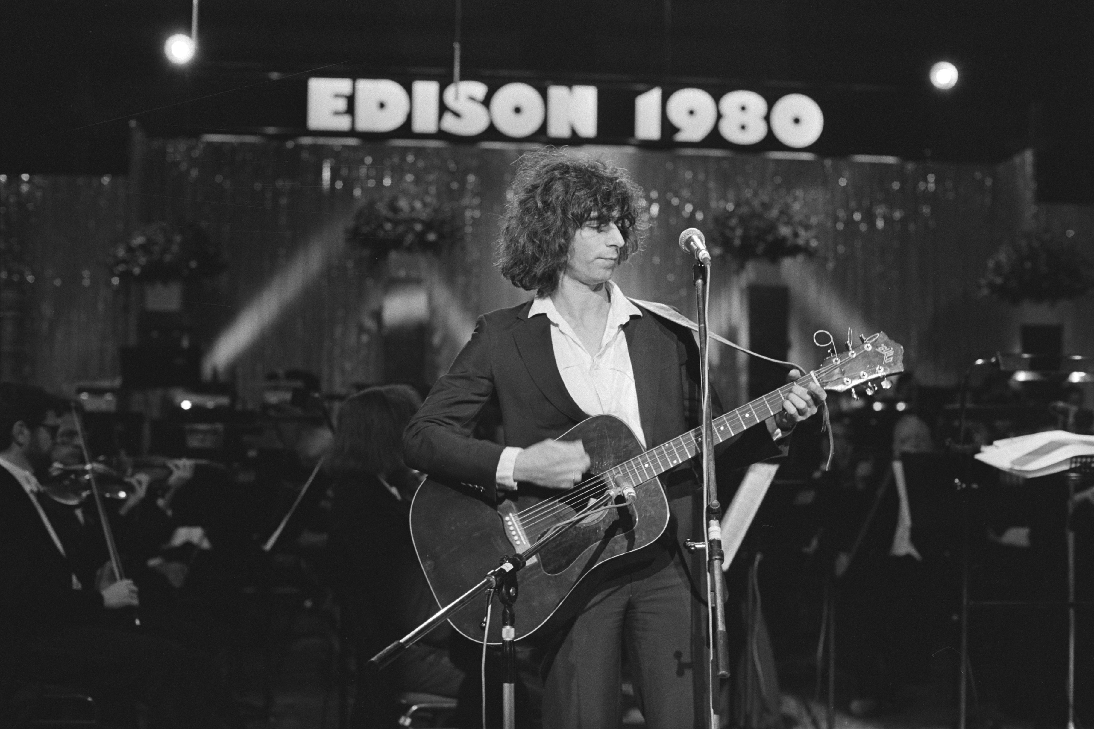 Boudewijn de Groot. Generale repetitie voor AVRO-programma Edisons in concert Muziekcentrum Vredenburg te Utrecht, uitzending 31-10 Datum 28 oktober 1980